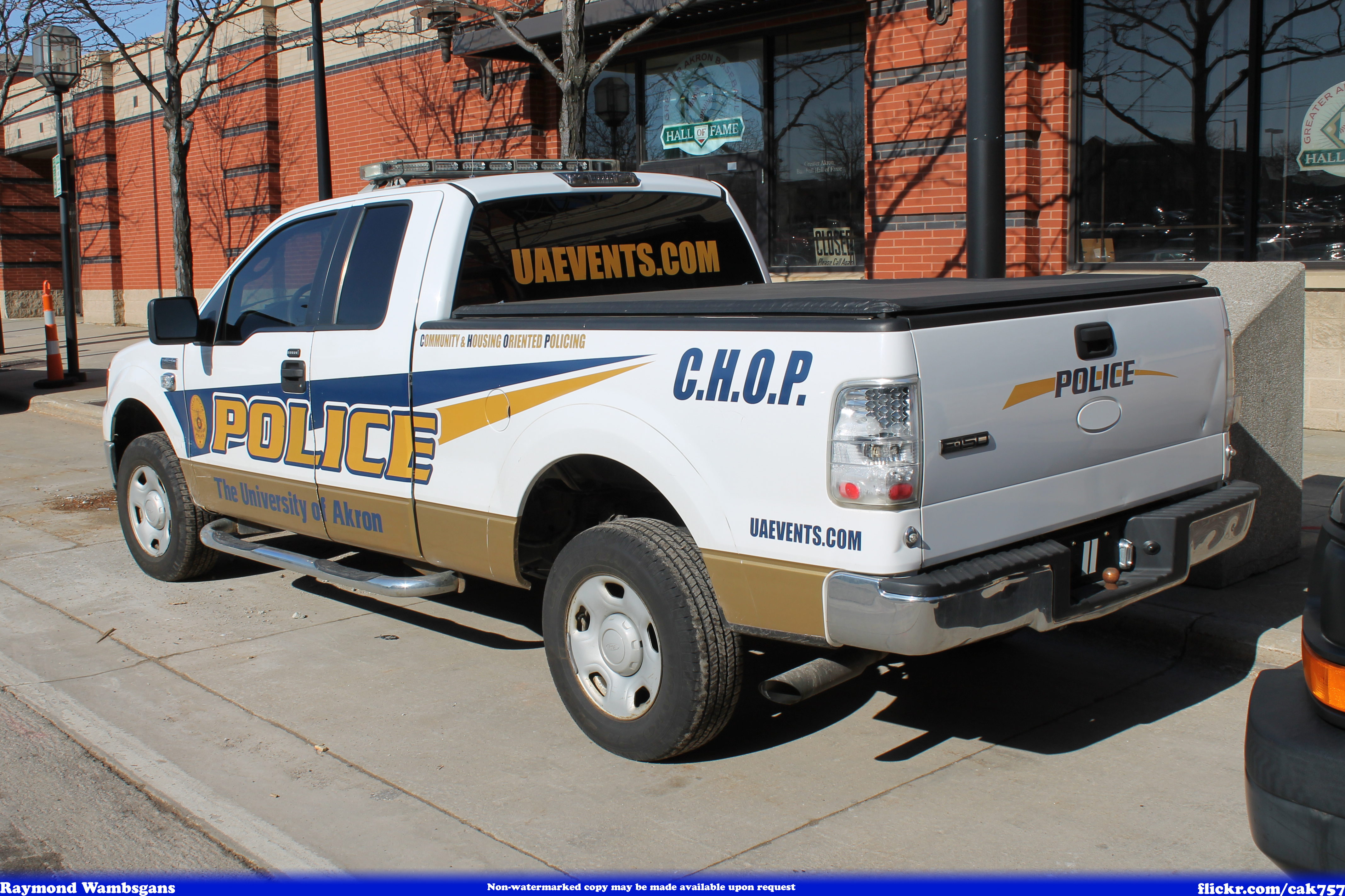 UAPD Ford F-150